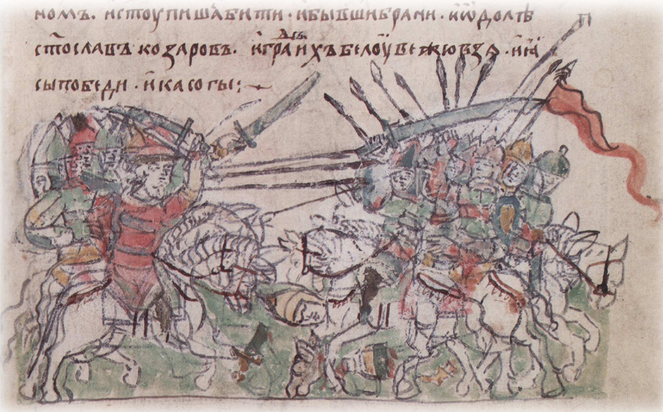 Восточный поход князя Свтослава в 965 году, в котором он захватил Белую Башню и разгромил Хазарский каганат.